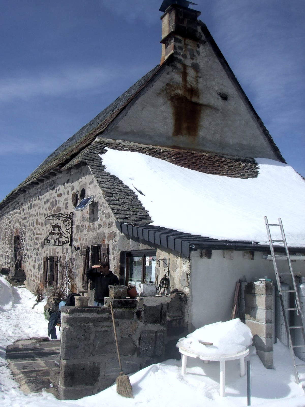 Buron de la Thuilières à Pailherols (15)